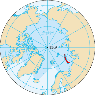 新地岛的位置